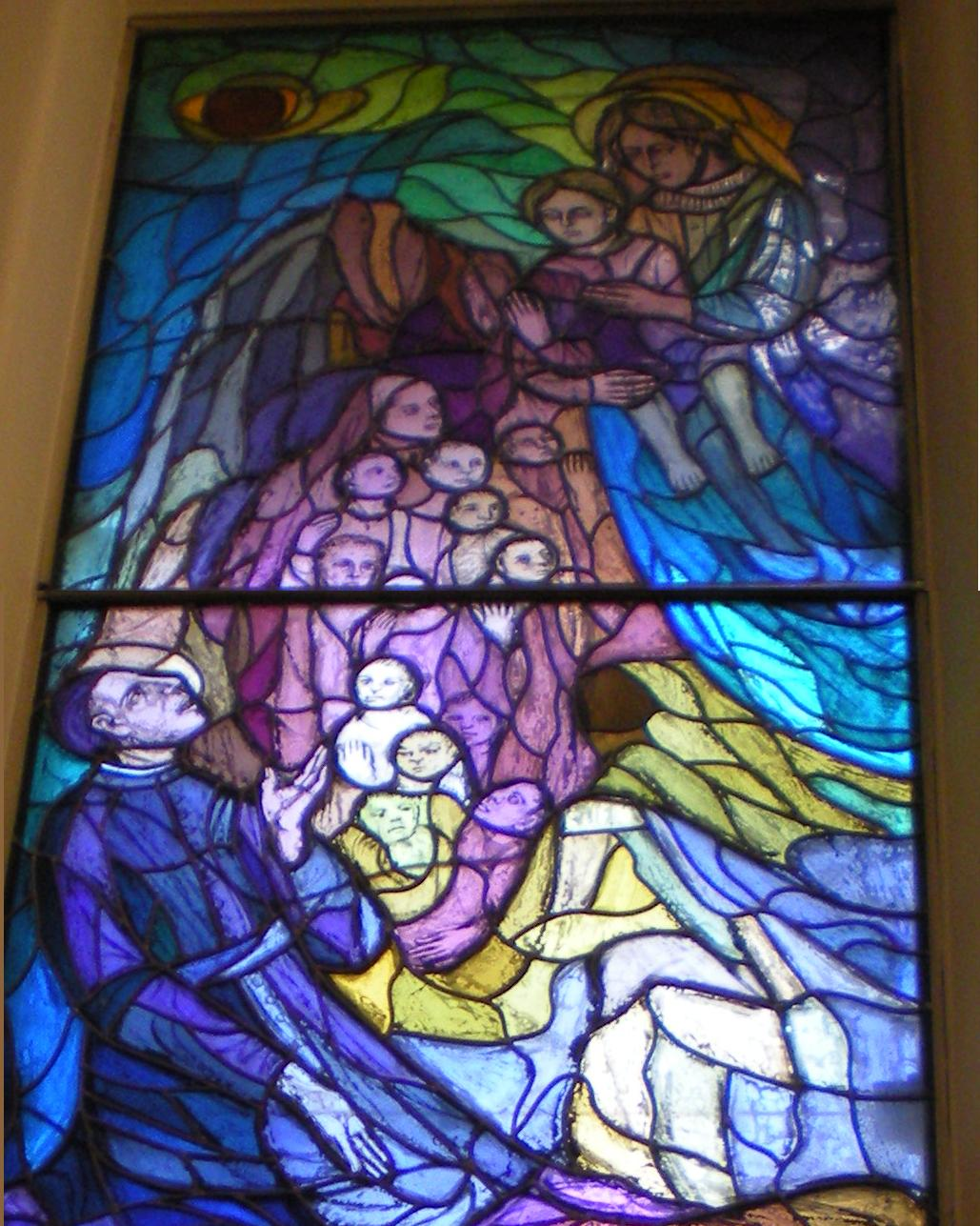 Vetrata conservata nella chiesa di Palermo dedicata al beato Giacomo Cusmano, nella quale riposano le sue spoglie. Rappresenta il sogno del beato, che vide la Vergine Maria proteggere le orfanelle da lui ospitate